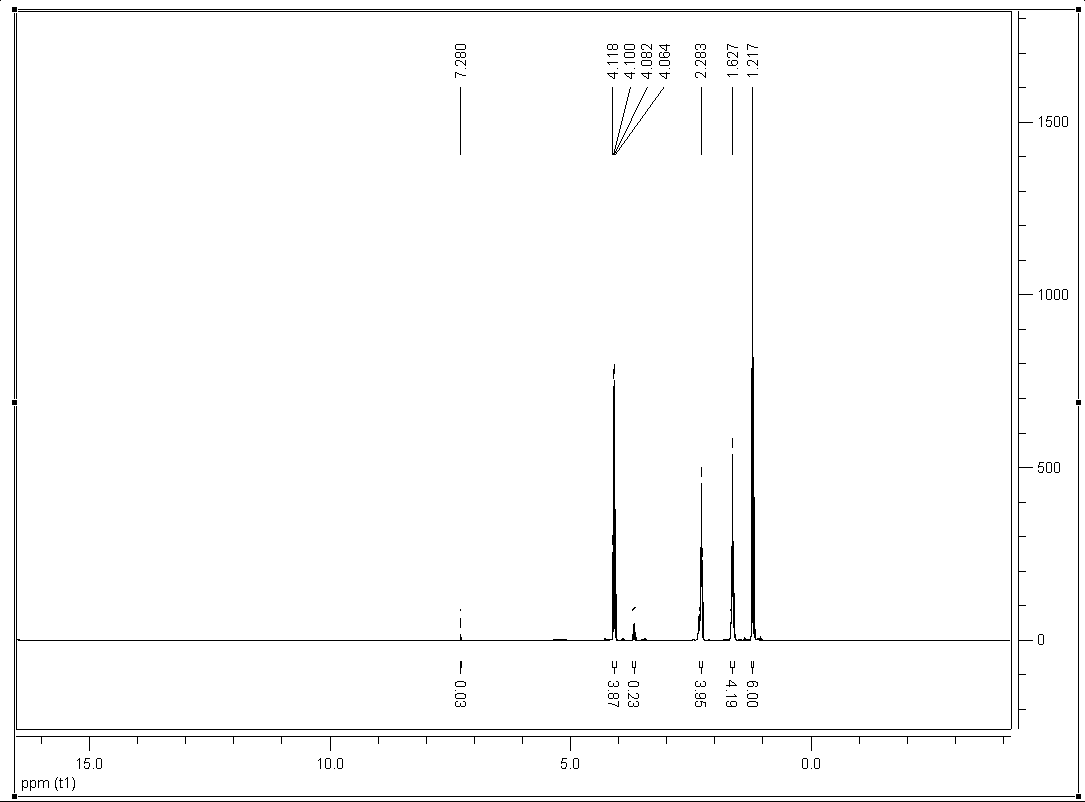 NMR-Spektrum Bild selbst erstellt mit MestreC, gemessen und Stoff hergestellt an der Universität Ulm